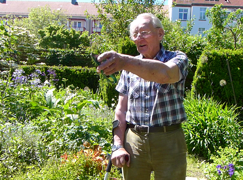 Helmut Rippl in seinem Garten in Cottbus